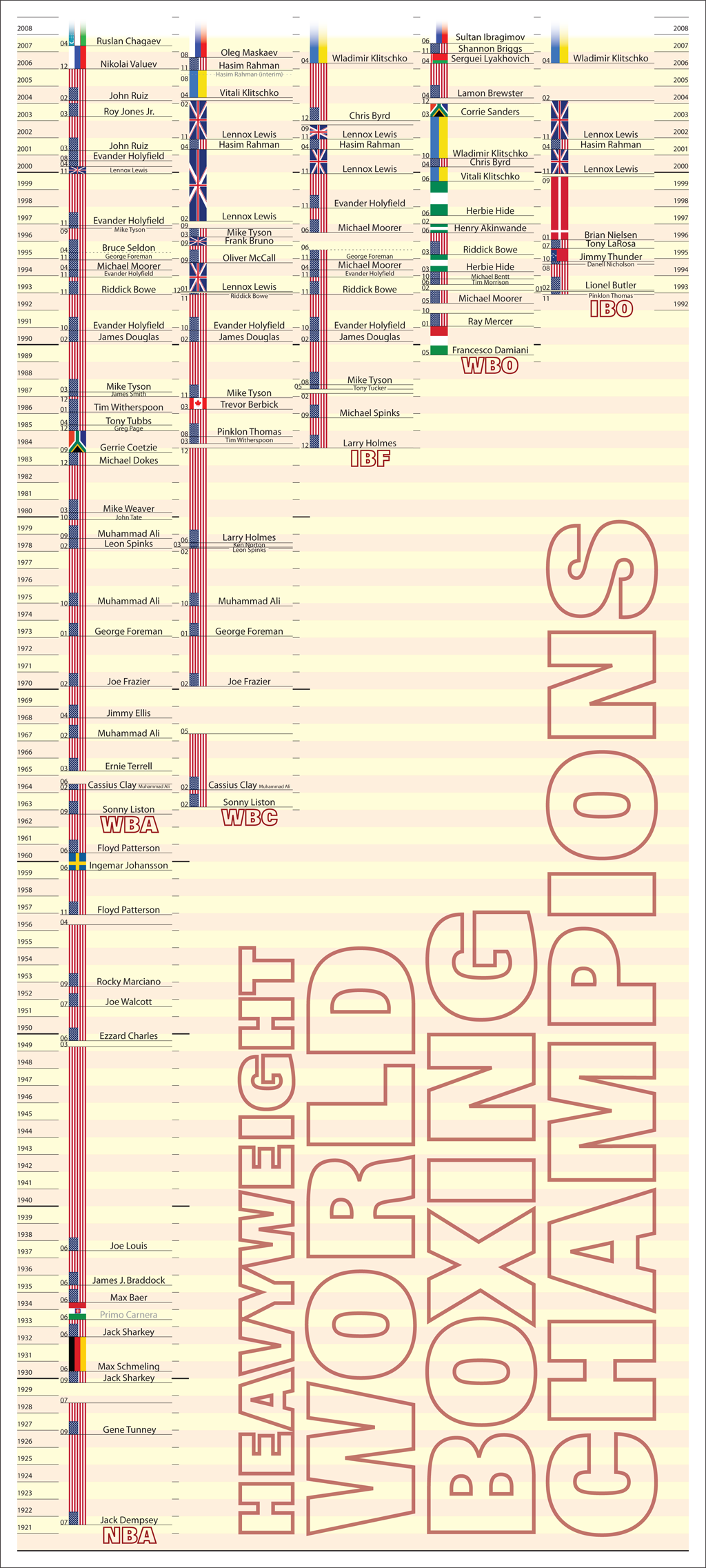 WORLD BOXING CHAMPIONS of NBA/WBA - WBC - IBF - WBO - IBO